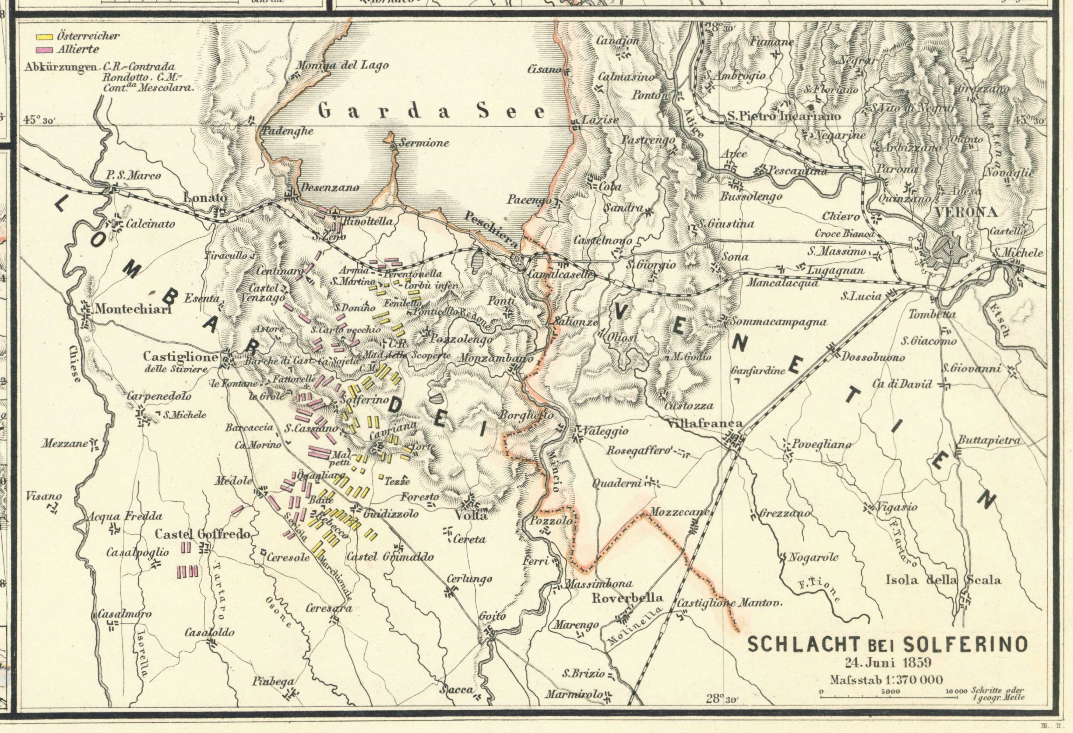 Schlacht bei Solferino 24. Juni 1859